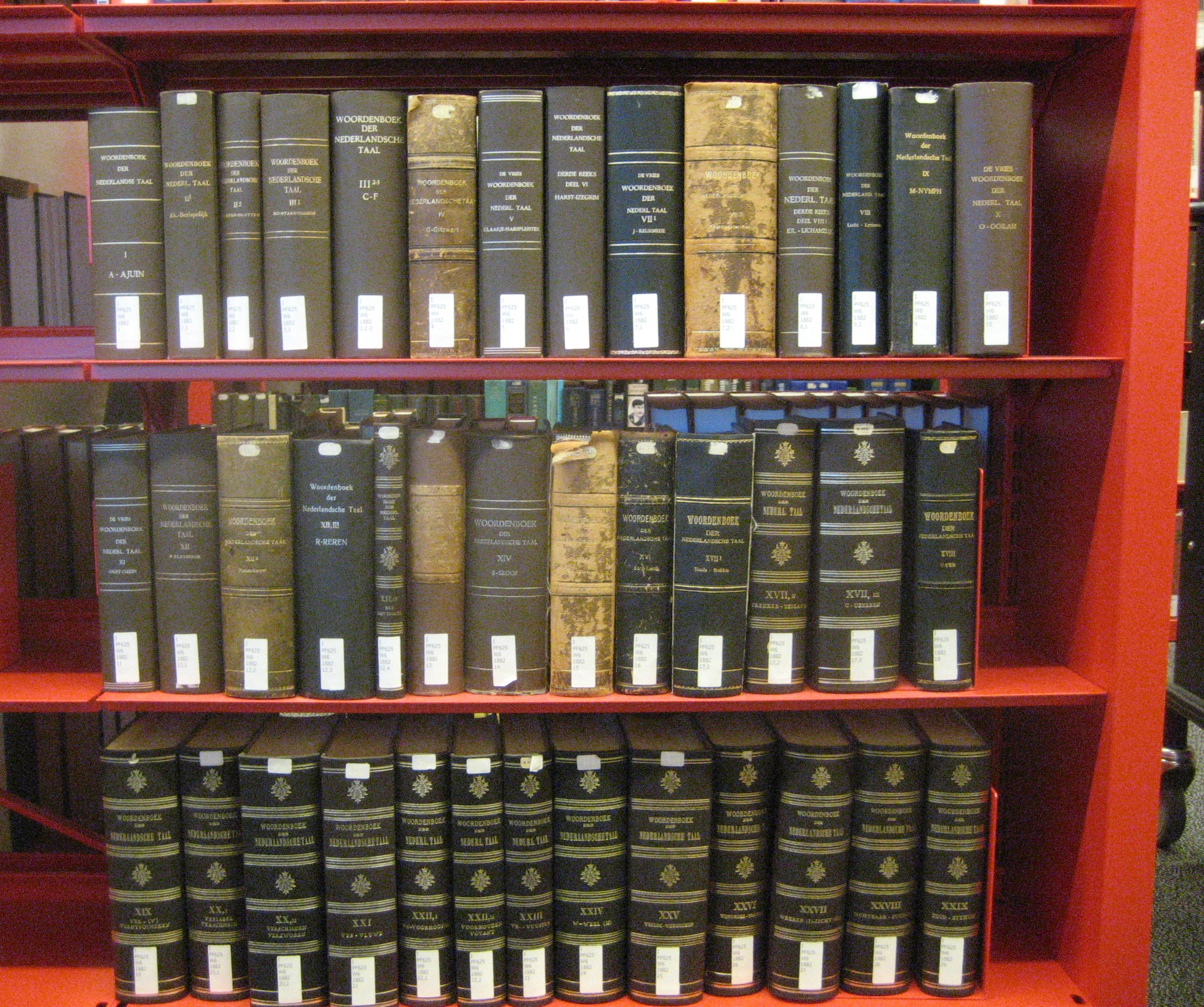 Woordenboek der Nederlandsche Taal, in de Universiteitsbibliotheek Leiden (Nederland)